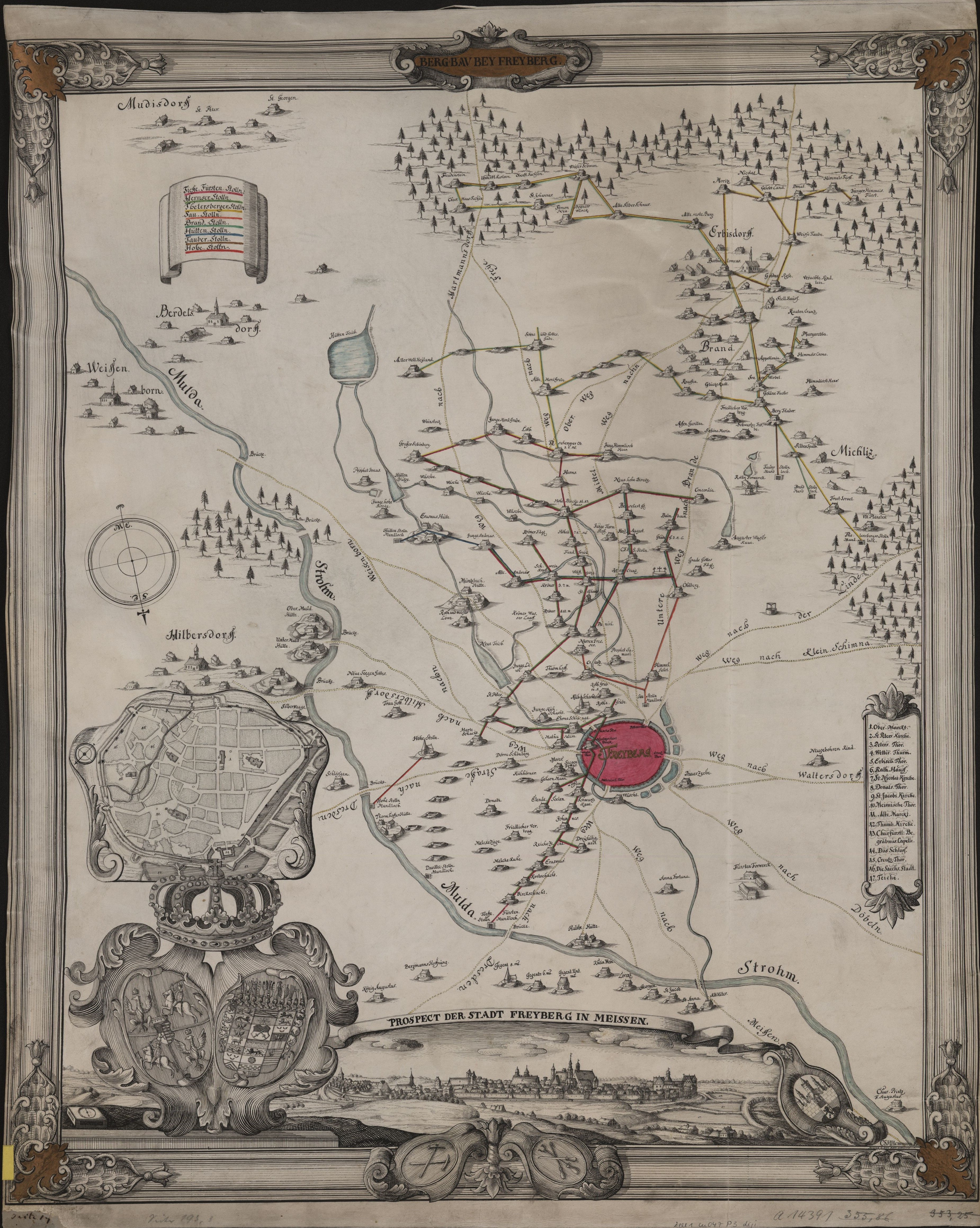 Bergbau bei Freiberg, Federzeichnung, 1745, Bergbav bey Freyberg. - [Ca. 1:25 000]. - Dresdae, 1745. - 1 Kt. : kolor. Federzeichng., Gesamtgr. 159 x 64 cm Mit Wappen, 1 Plan und 1 Ansicht. - Süden oben, 1745